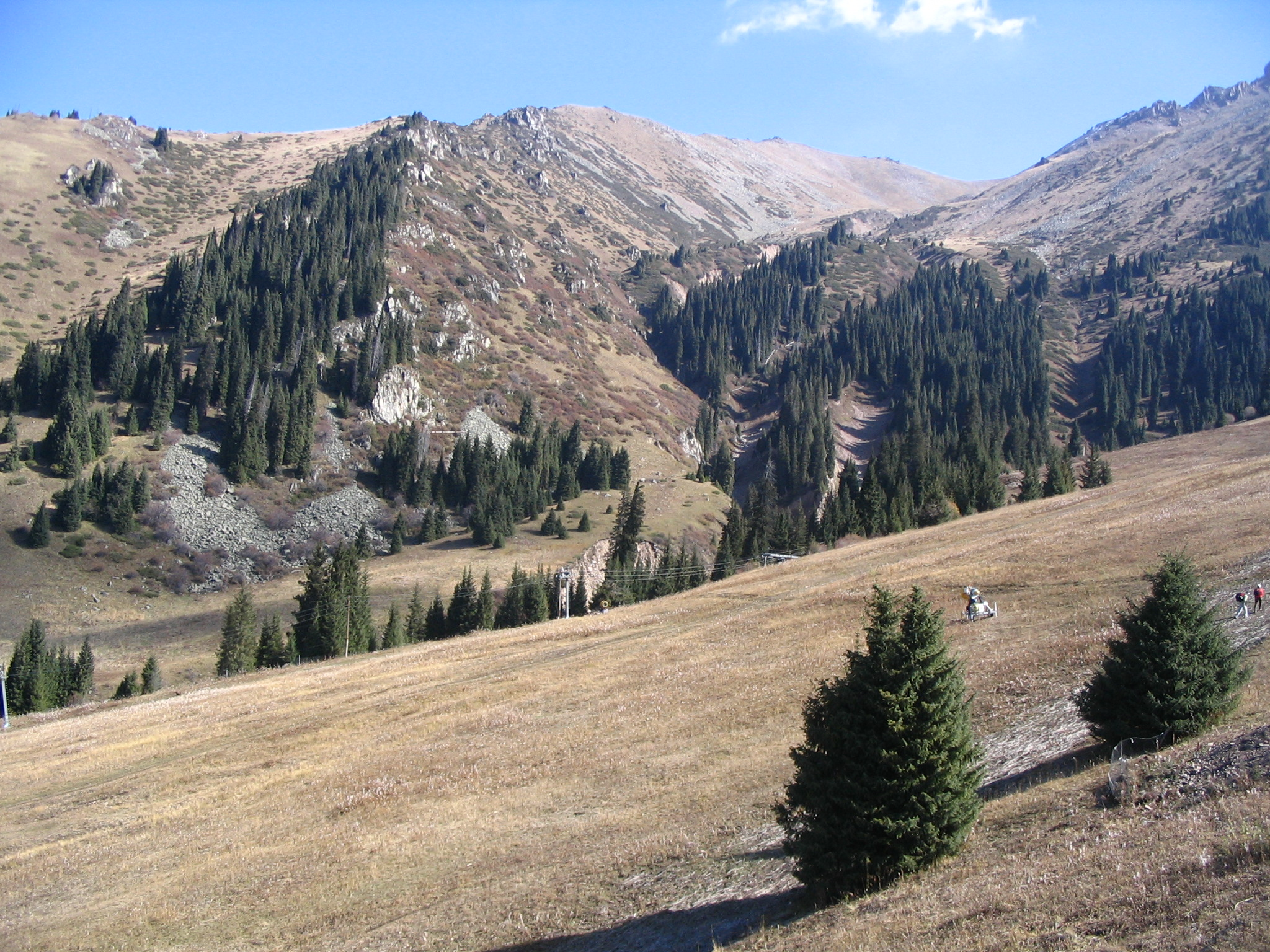 Chimbulak - Kazakhstan - altitude 2600 m - en automne - piste de ski et épicéas de Schrenk.